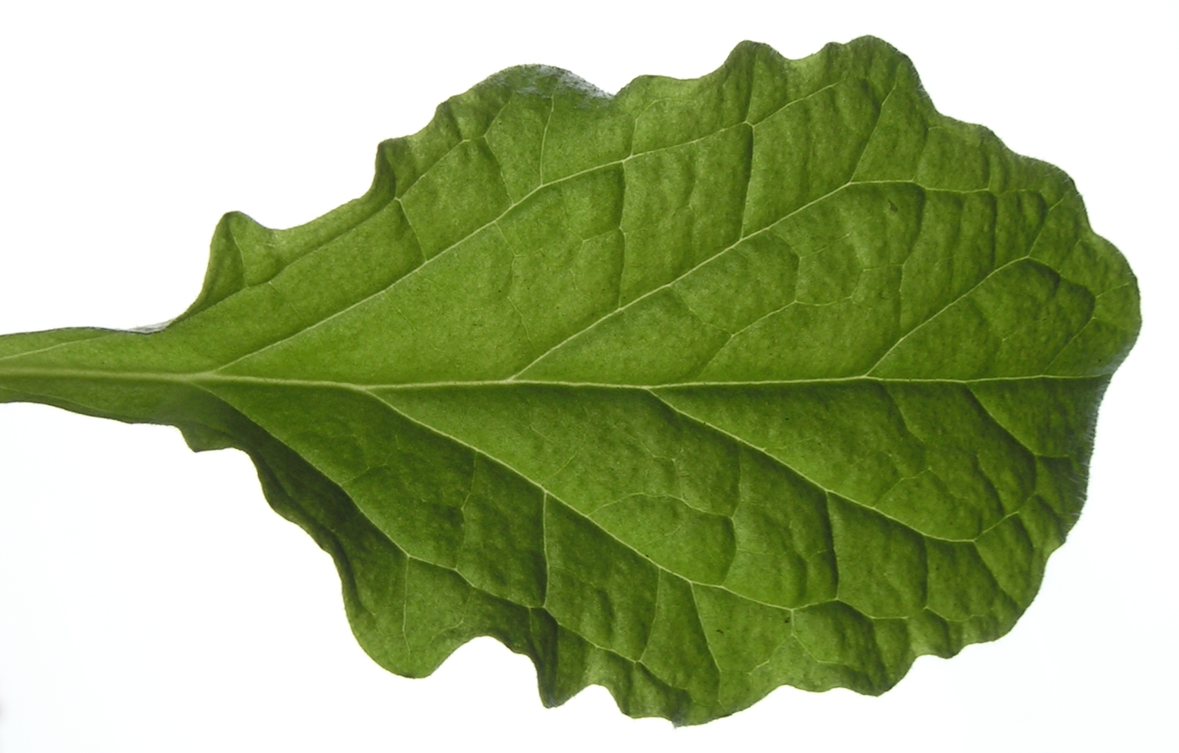 Ajuga reptans. Moscow region, Russia.